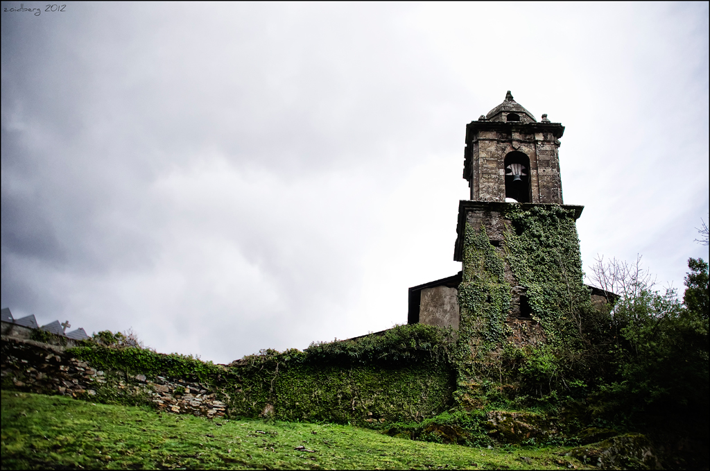 Igrexa de Vilamor, Folgoso do Courel.